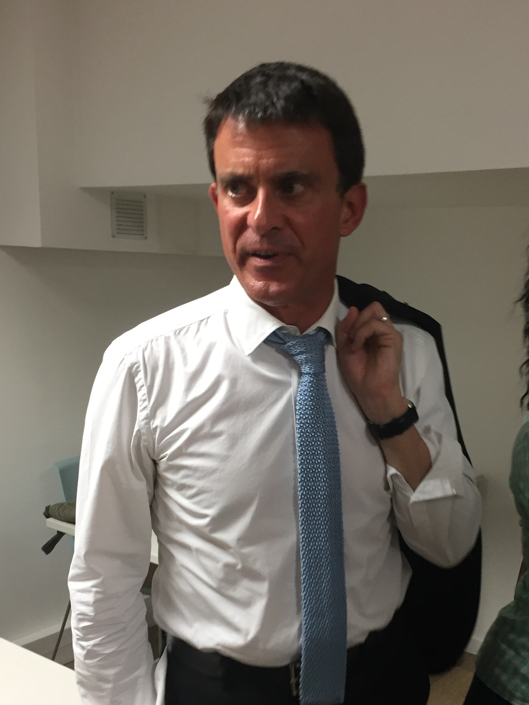 Manuel Valls en juillet 2017 à Évry (Essonne, France)